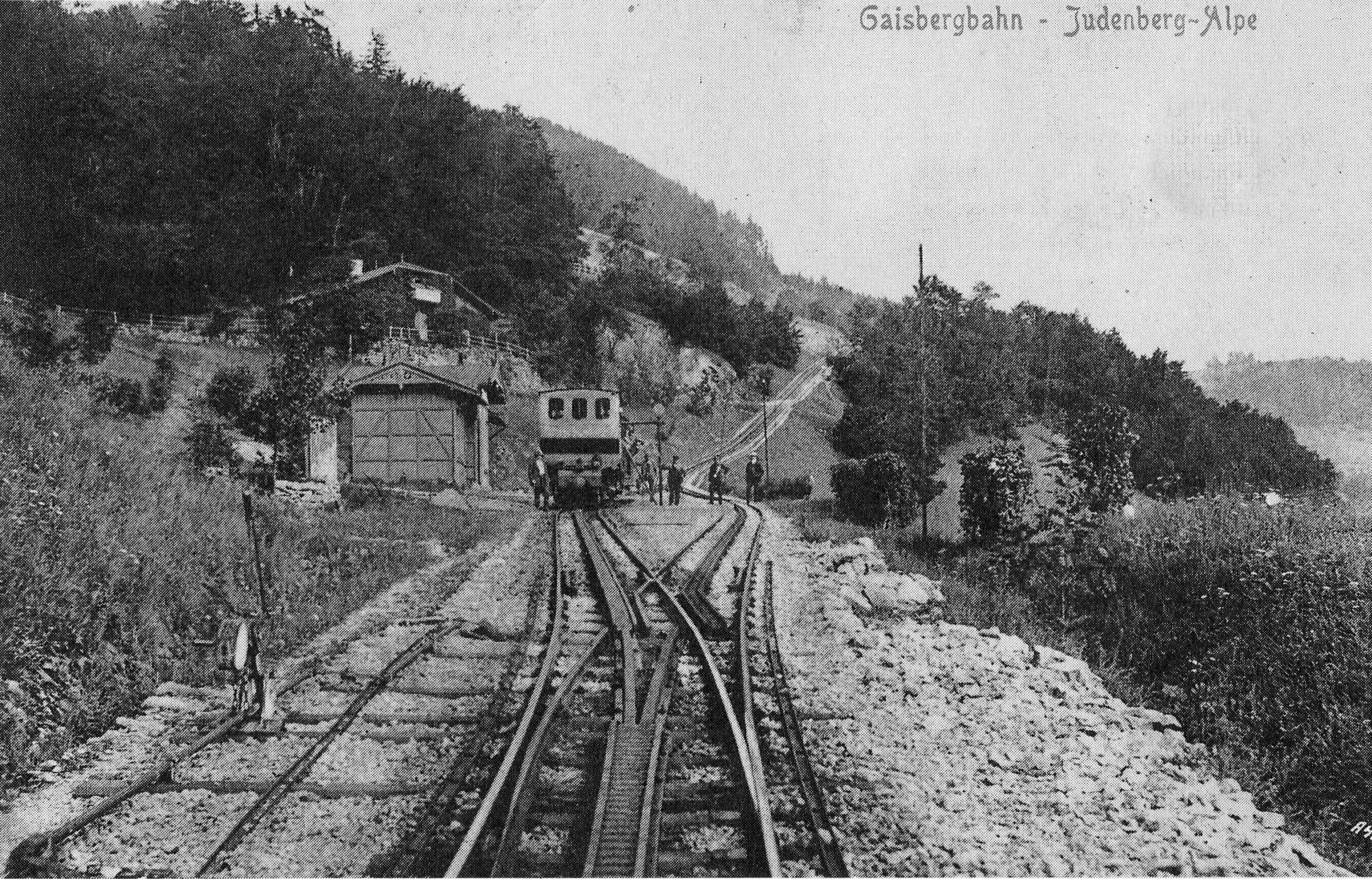 Ansichtskarte von 1912 (Fotostudio Pflauder) mit der Haltestelle Judenbergalpe an der Strecke der ehemaligen Gaisbergbahn, einer Zahnradbahn von Salzburg-Parsch auf die Gaisbergspitze. (Bildrasterung im gedruckten Original.)